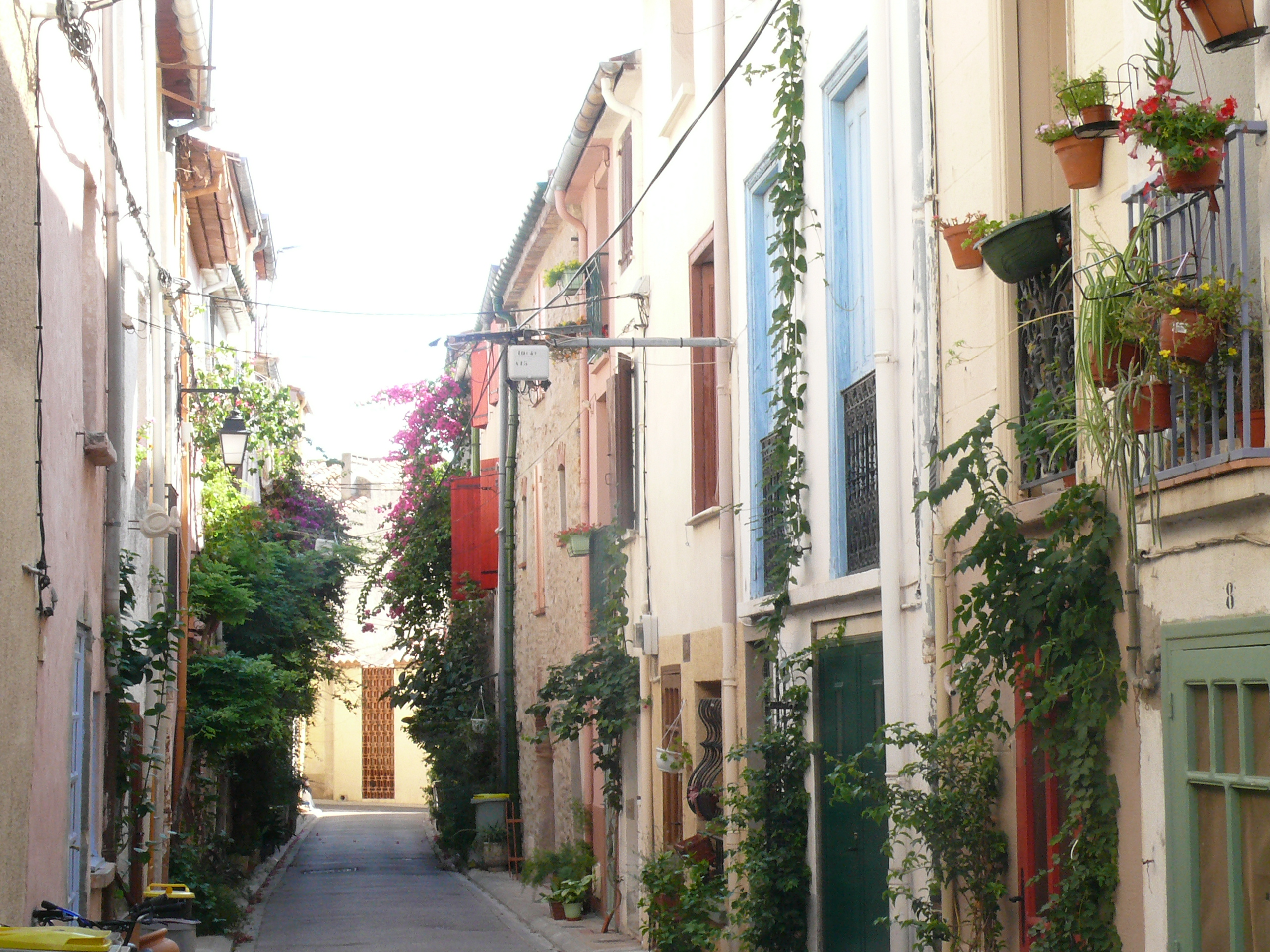 Argelès-sur-Mer (Pyrénées-Orientales, France) - Rue de la Fraternité ou rue Vermeille à l'heure du marché hebdomadaire d'aout.